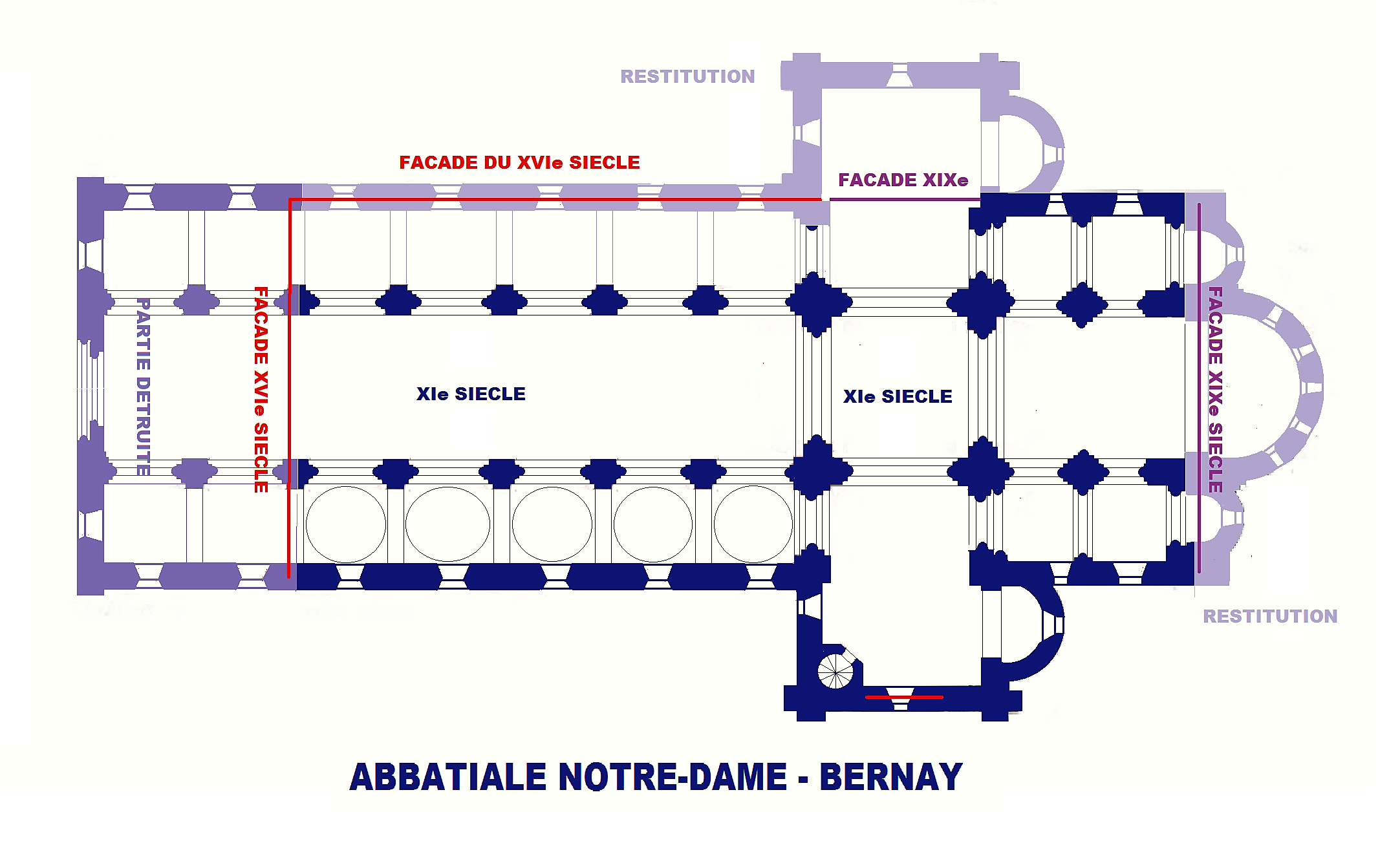 Abbatiale de Bernay, Plan